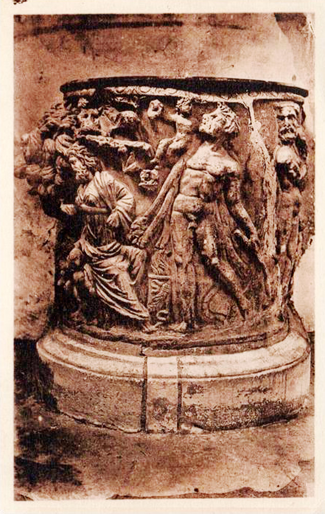 Baptistère bacchique de l'église de Cadenet